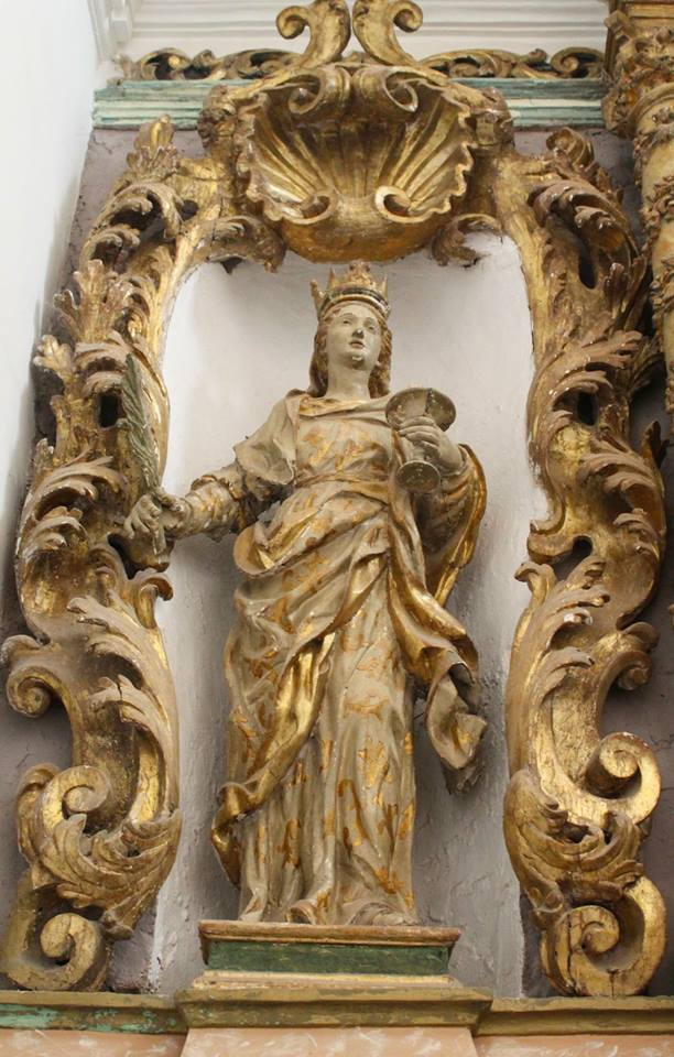 Santa lucia altare castello